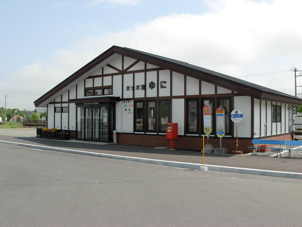 Yuni station（Hokkaido_Railway_Company）